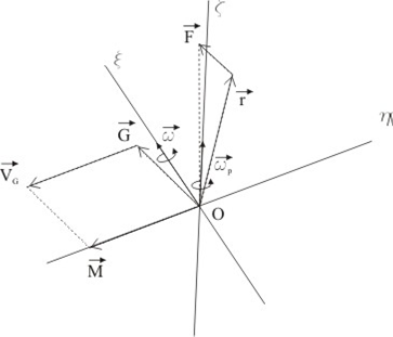 Схема към Теорема на Резал